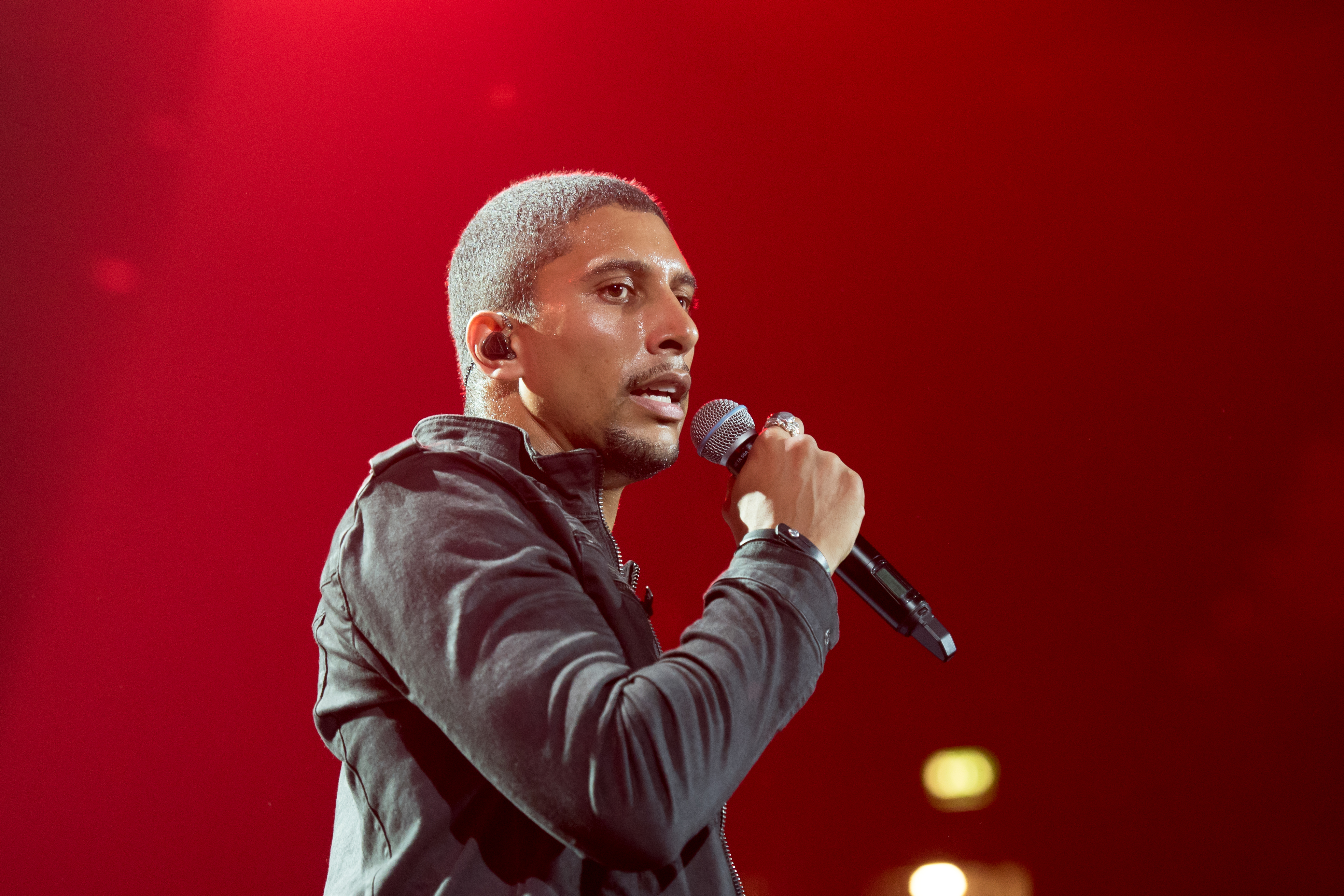 Andreas Bourani beim Global Citizen Festival in Hamburg